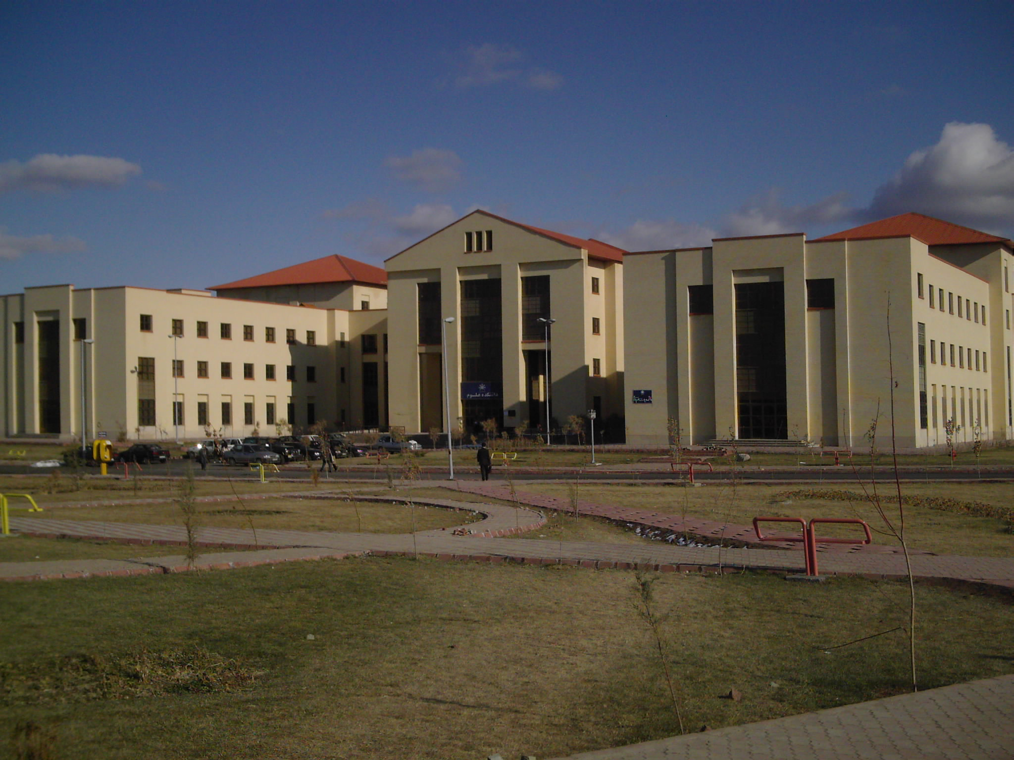 نمایی از دانشکده علوم دانشگاه محقق اردبیلی